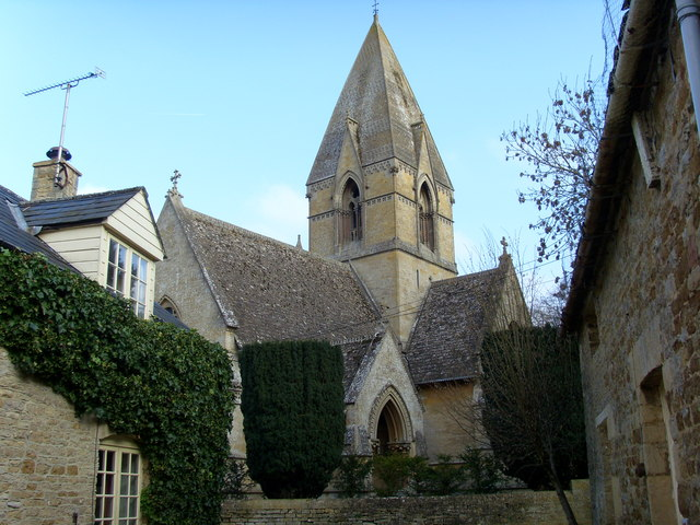 St Peters Church Daylesford